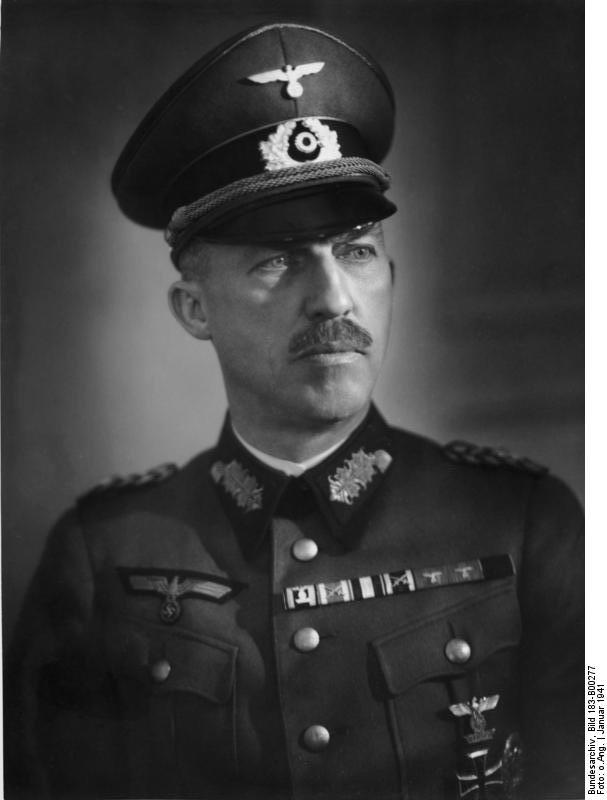 Paul von Hase General-Leutnant v. Hase, der neue Kommandant von Berlin Fot. Hei., 16.1.1941 [Herausgabedatum] Abgebildete Personen: Hase, Paul von: Generalleutnant, Kommandant v. Berlin, Prozess 20. Juli 1944, Deutschland